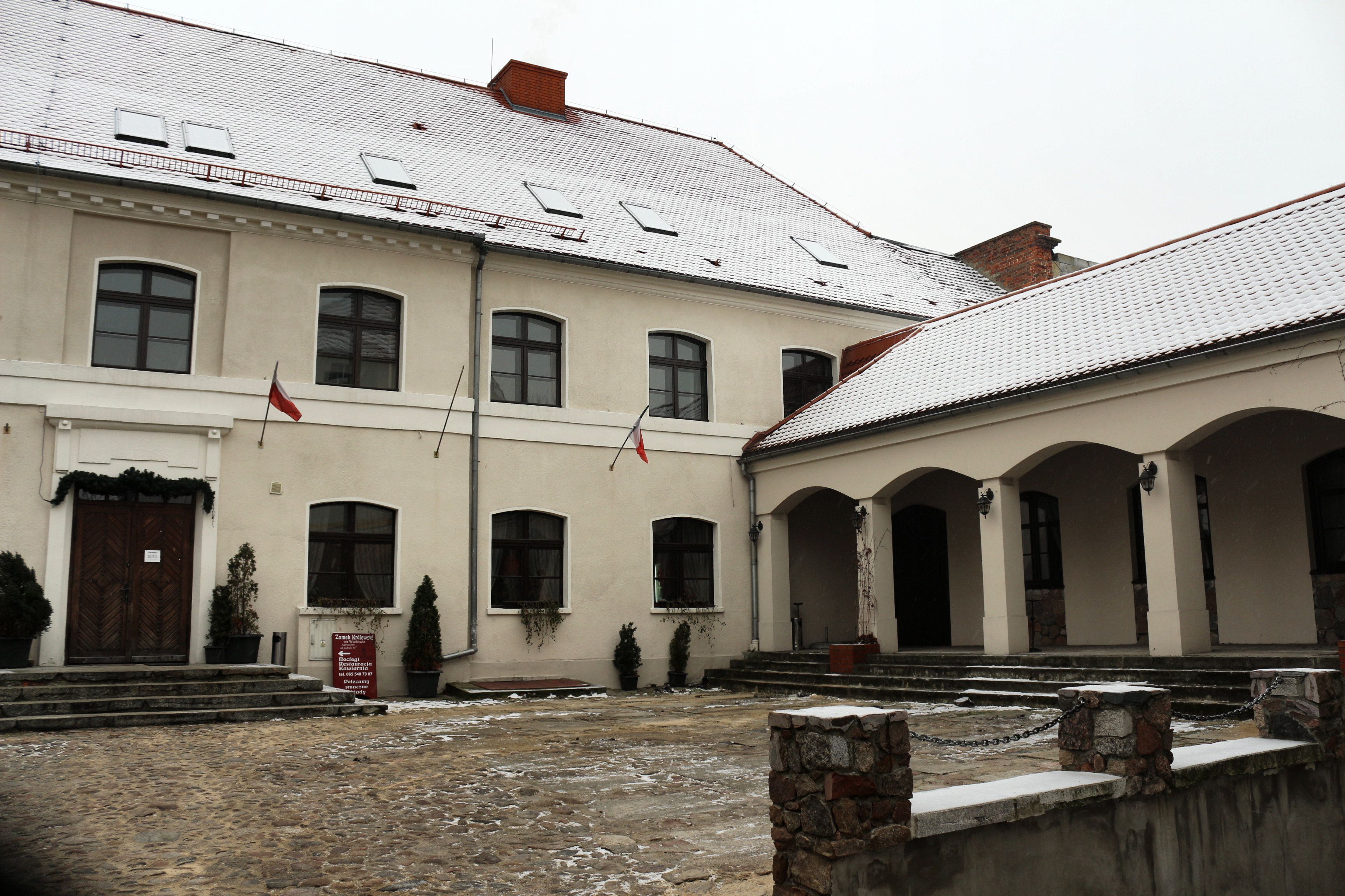 Wschowa, dom (z reliktami zamku), XIV, XIX